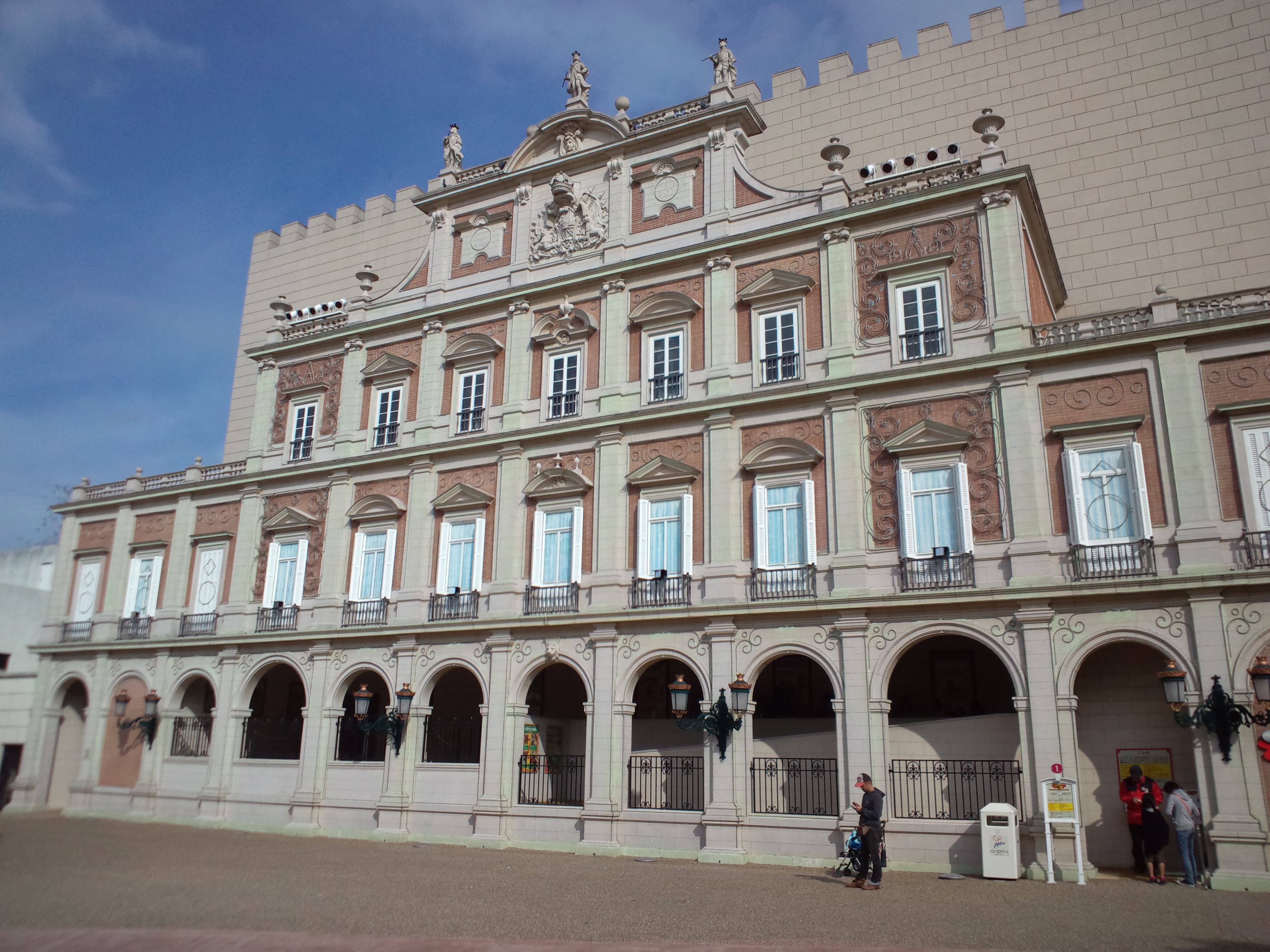 志摩スペイン村、パルケエスパーニャ 闘牛コースター「マタドール」